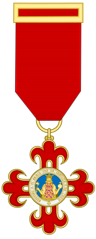 Cruz de la Orden Civil de Alfonso X el Sabio